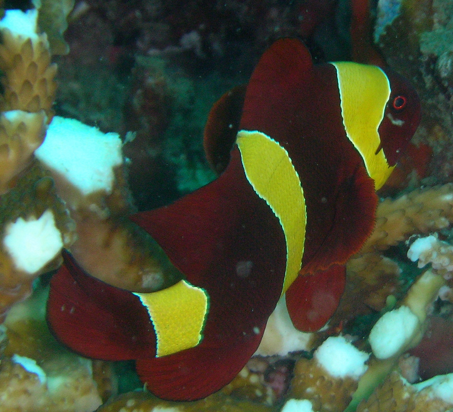 Premnas biaculeatus, en las islas de Andamán, India